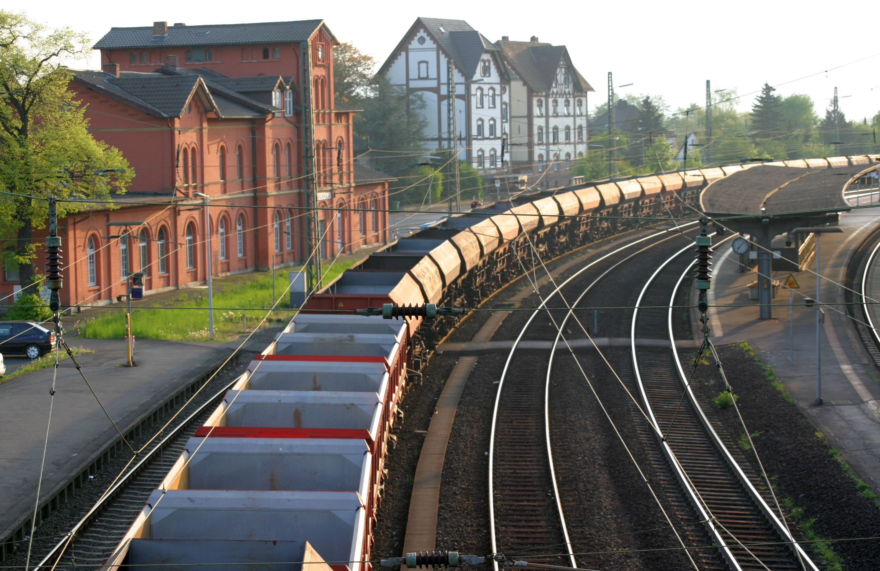 Heute dient die Ohmtalbahn ausschließlich dem Güterverkehr. Vom Werk Nieder Ofleiden der Mitteldeutschen Hartstein Industrie (MHI) wird Schotter per Bahn abtransportiert. Hier stehen leere Waggons im Bahnhof Kirchhain, wo Anschluss zur Main-Weser-Bahn besteht.